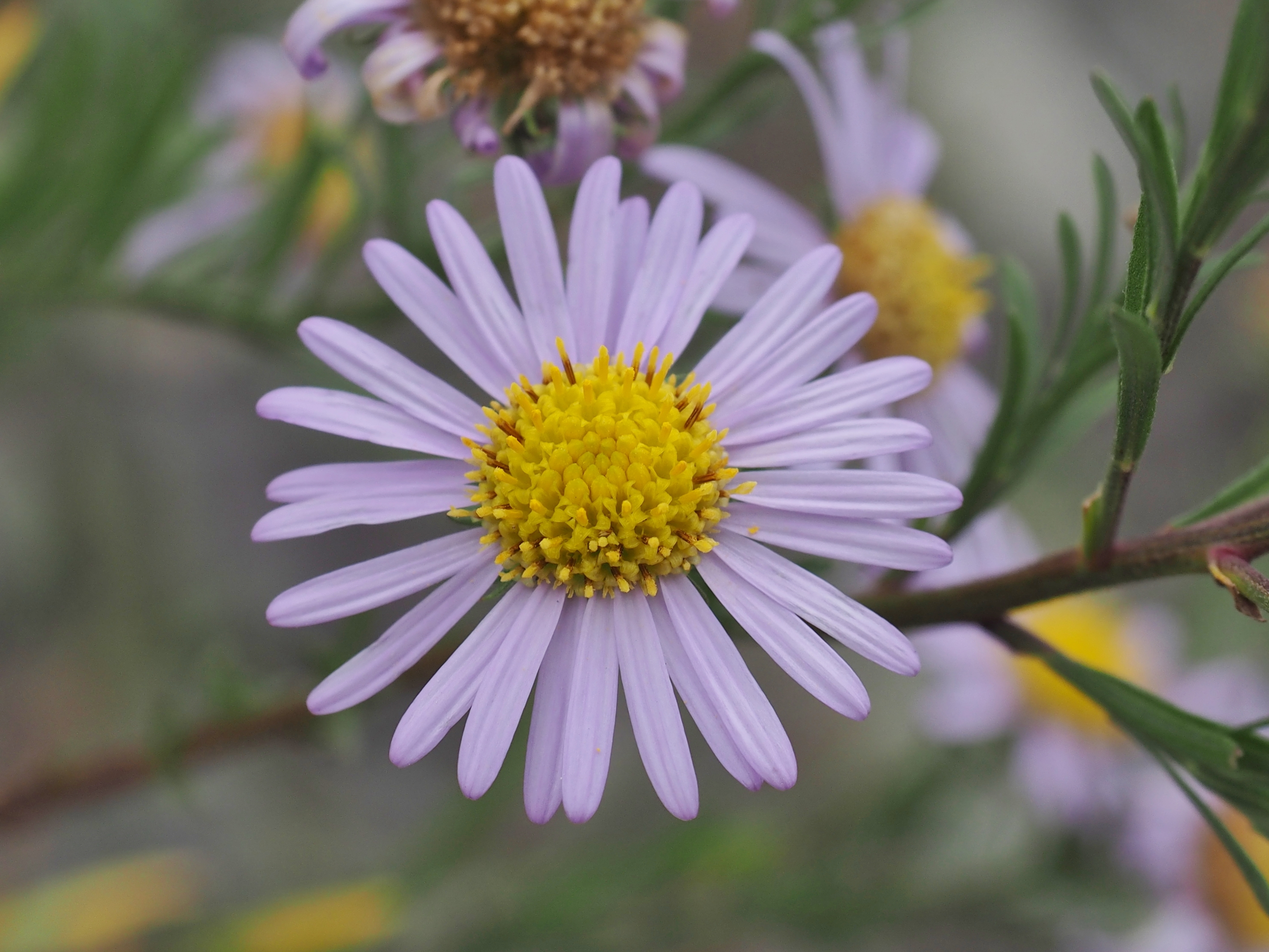 神奈川県愛川町